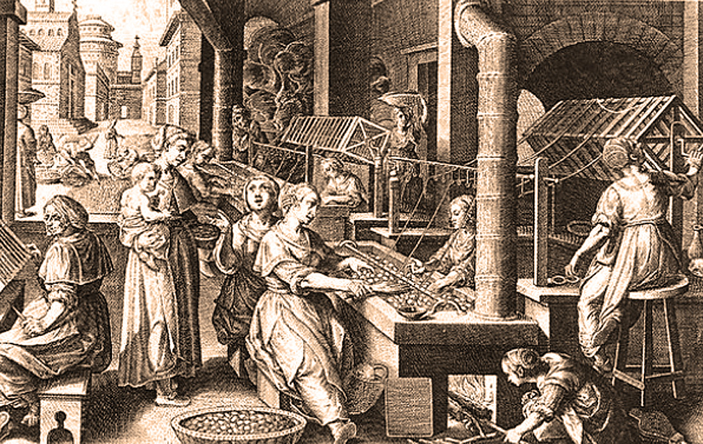 Décoconage et moulinage de la soie pour préparer son tissage